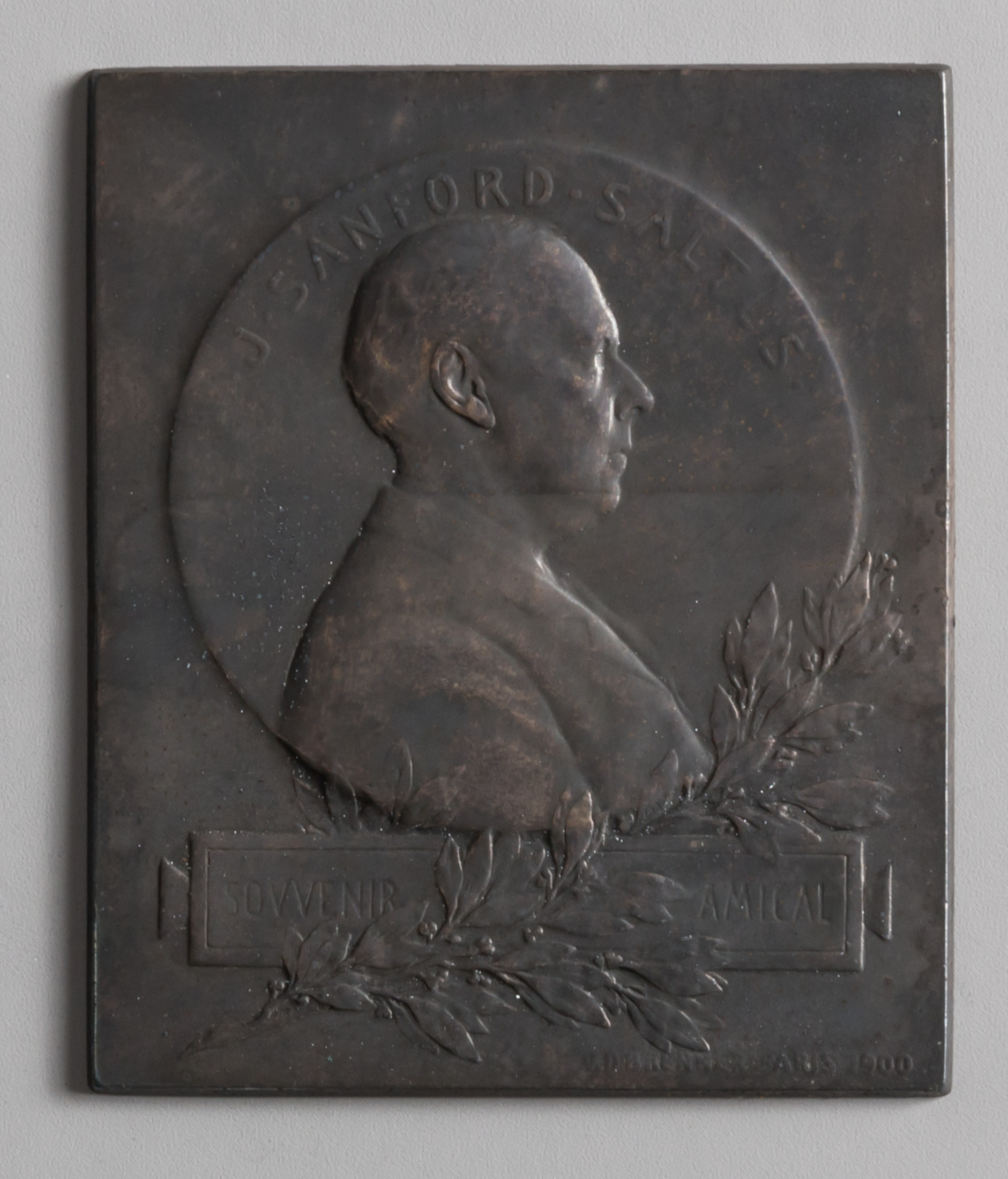 Medal; Sculpture